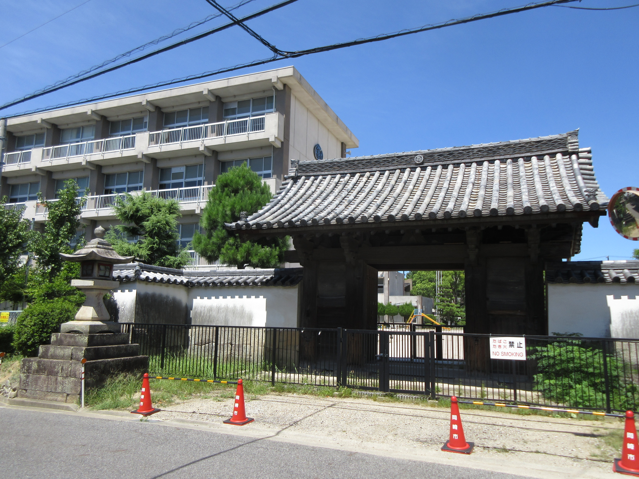 岡崎市立大樹寺小学校（岡崎市鴨田町）